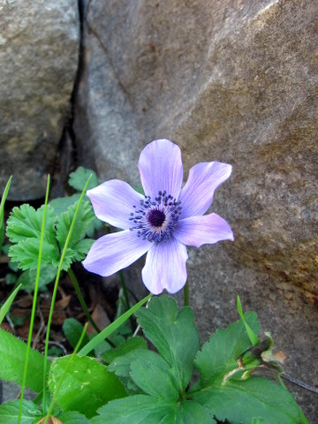 Anemone coronaria, כלנית מצויה.